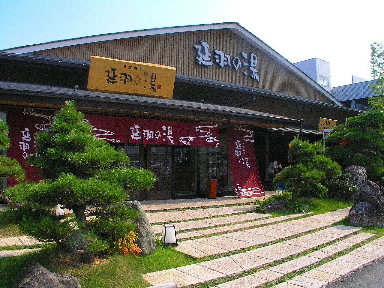 延羽の湯